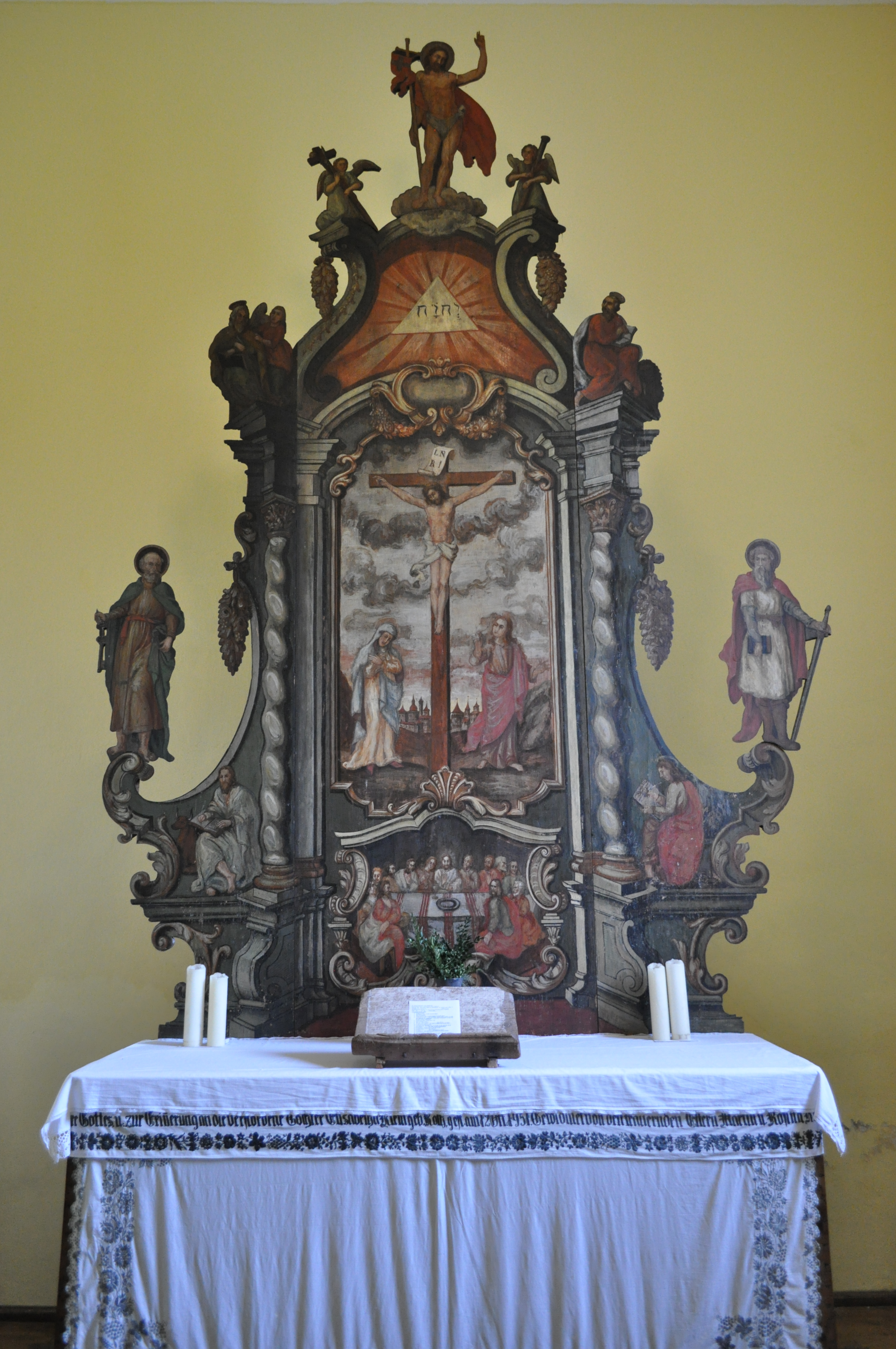 Biserica evanghelică din satul Reciu, județul Alba